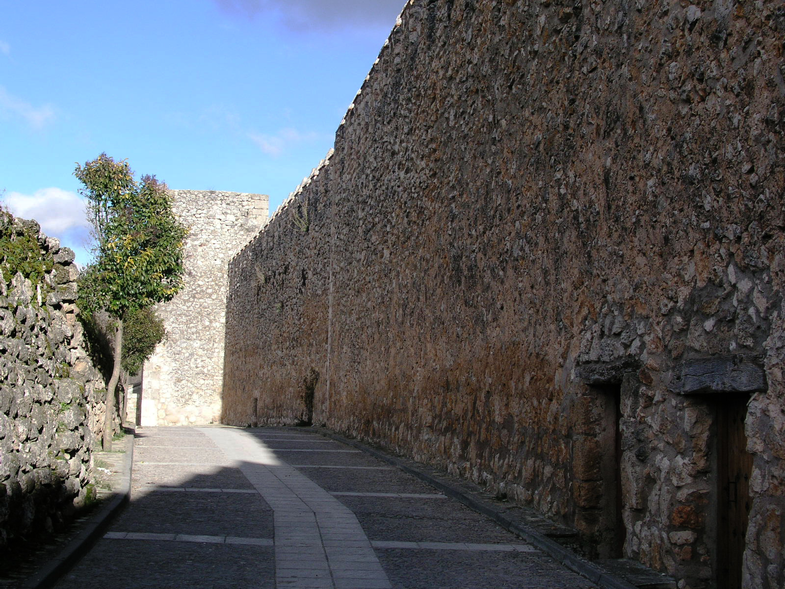 Brihuega, Arabic stone wall, Provincia de Guadalajara, Spain